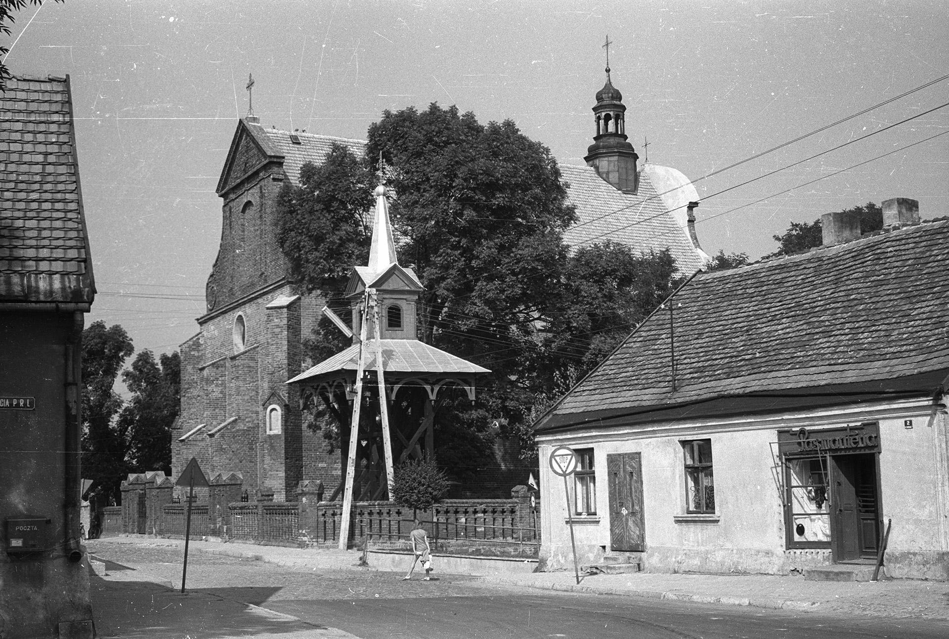 Kościół Znalezienia Krzyża Świętego w Radziejowie (źródło zdjęcia błędnie opisuje go jako kościół w Ślesinie)